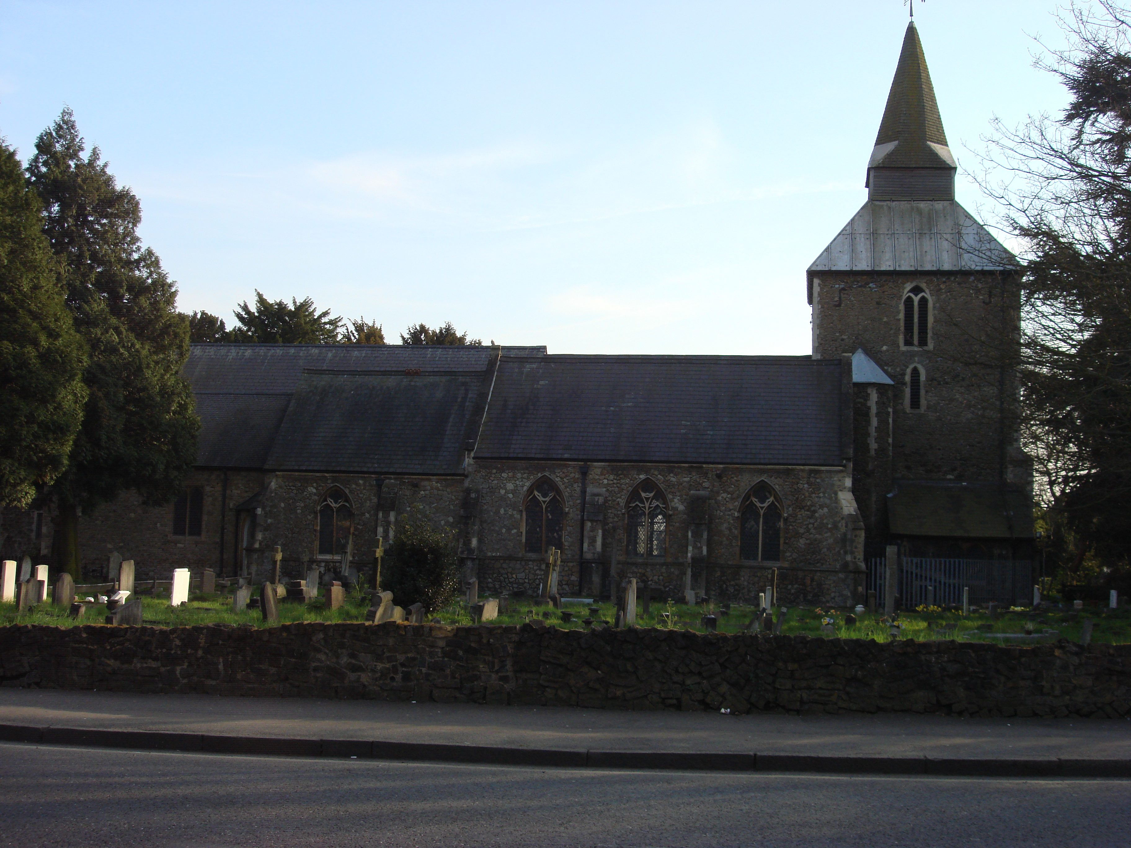 Upminster